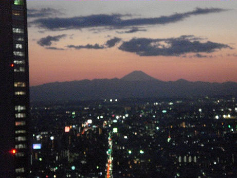 Sunset on mout Fuji